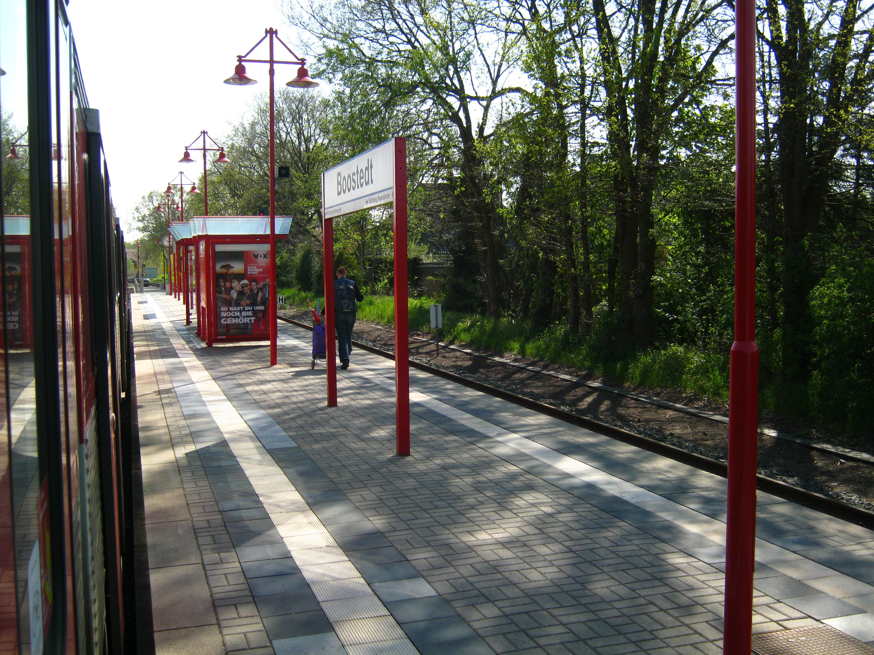 AKN Eisenbahn Station Boostedt.